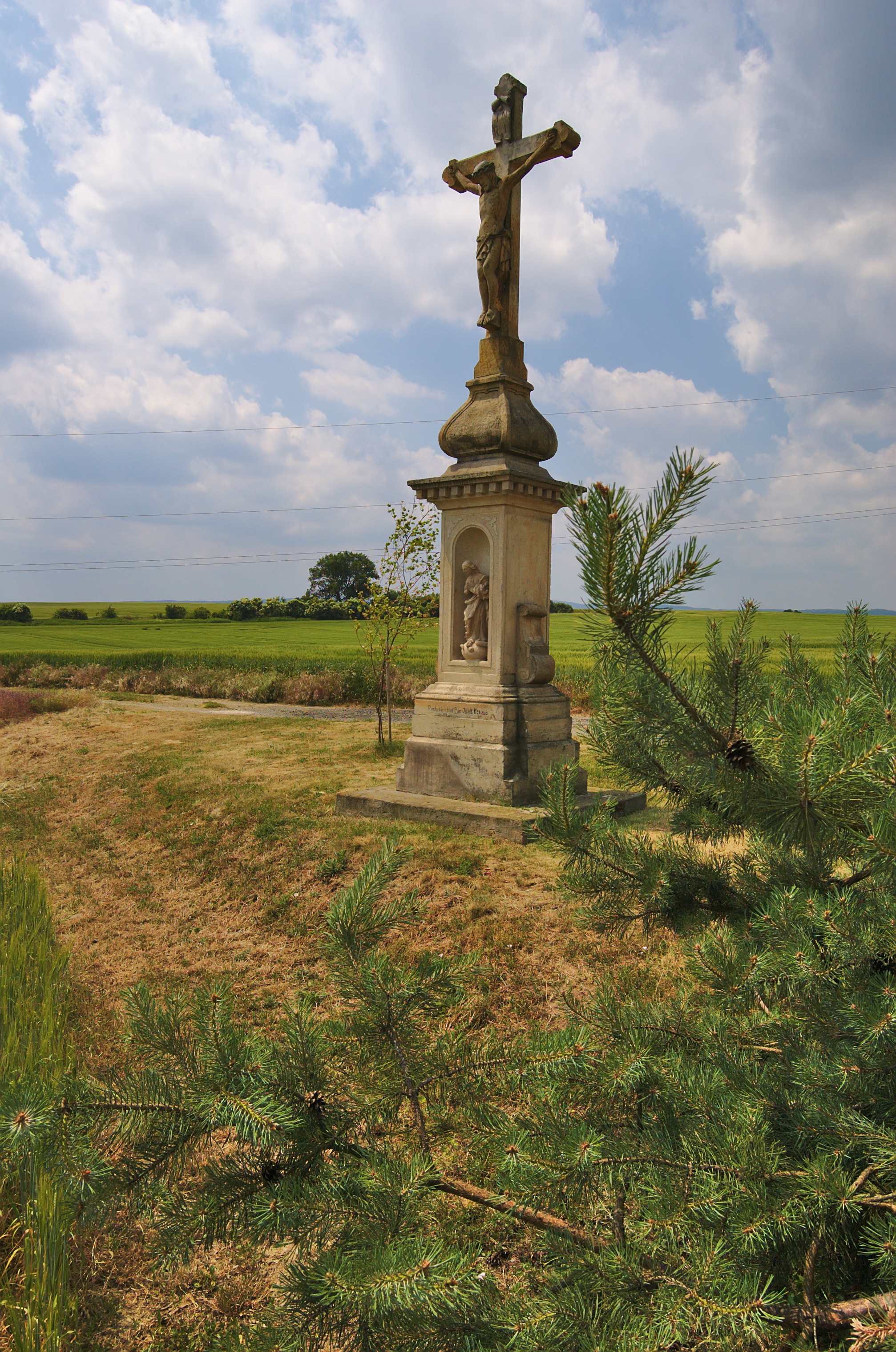 Kříž nad obcí, Ohrozim, okres Prostějov